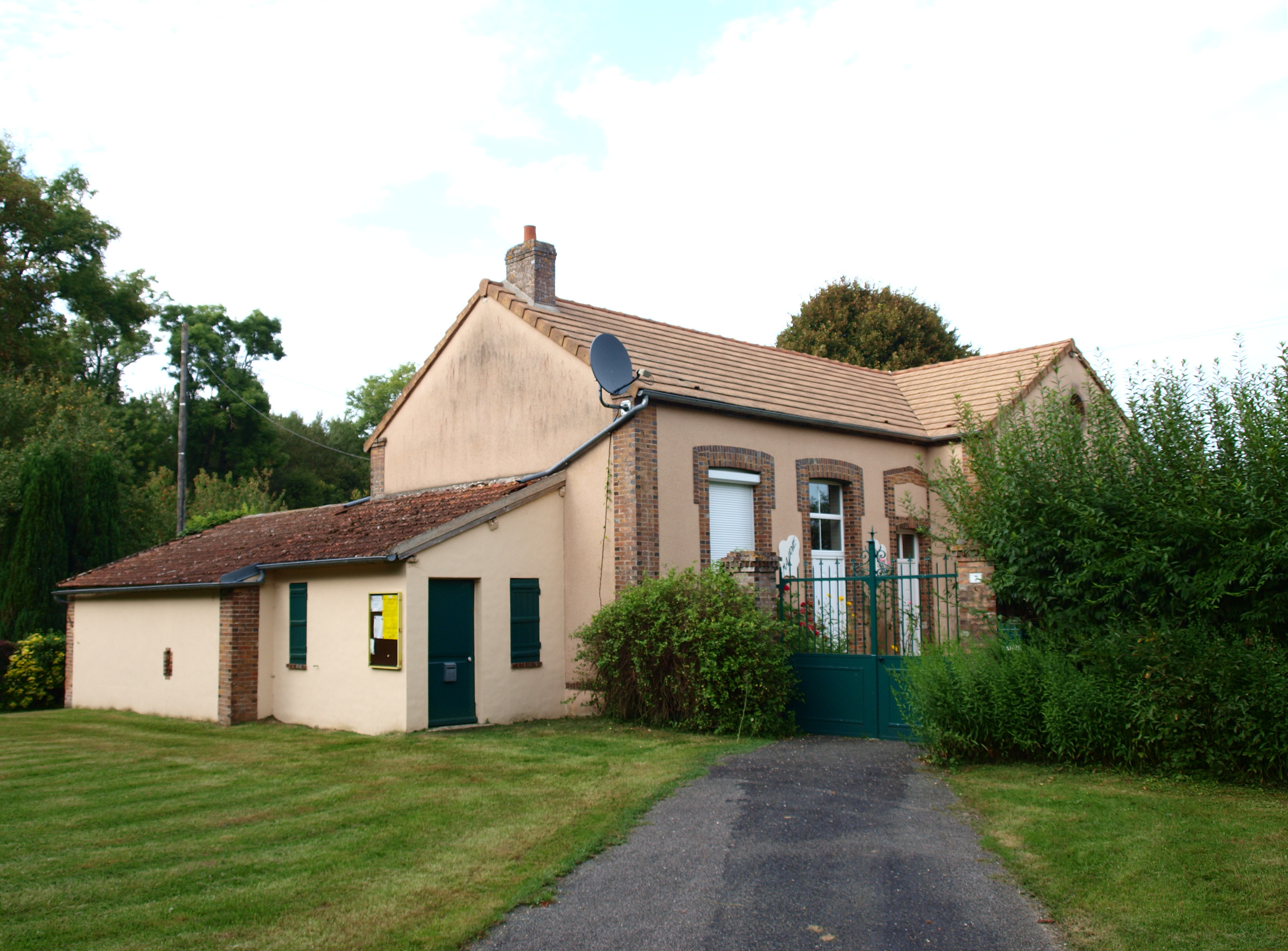 Courtoin (Yonne, France) ; mairie